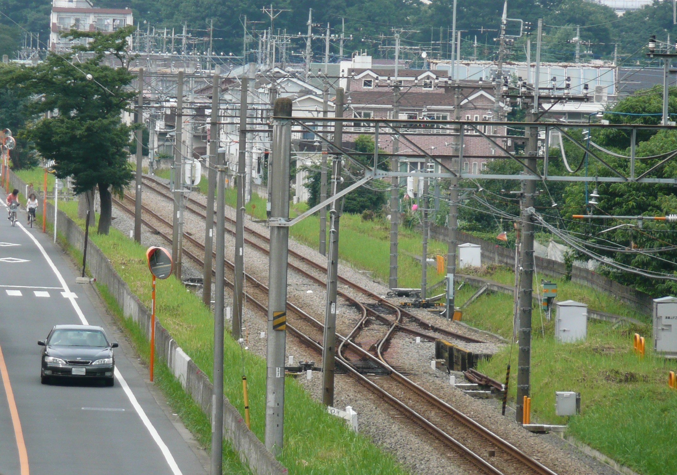 本町信号所（国分寺駅方から撮影）